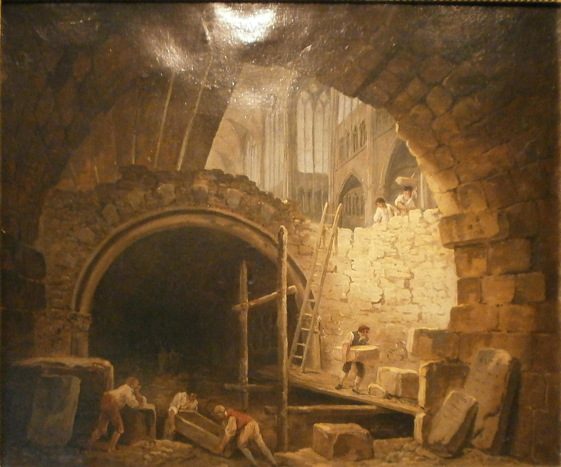 La violation des caveaux des rois dans la basilique de Saint-Denislabel QS:Lfr,"La violation des caveaux des rois dans la basilique de Saint-Denis"